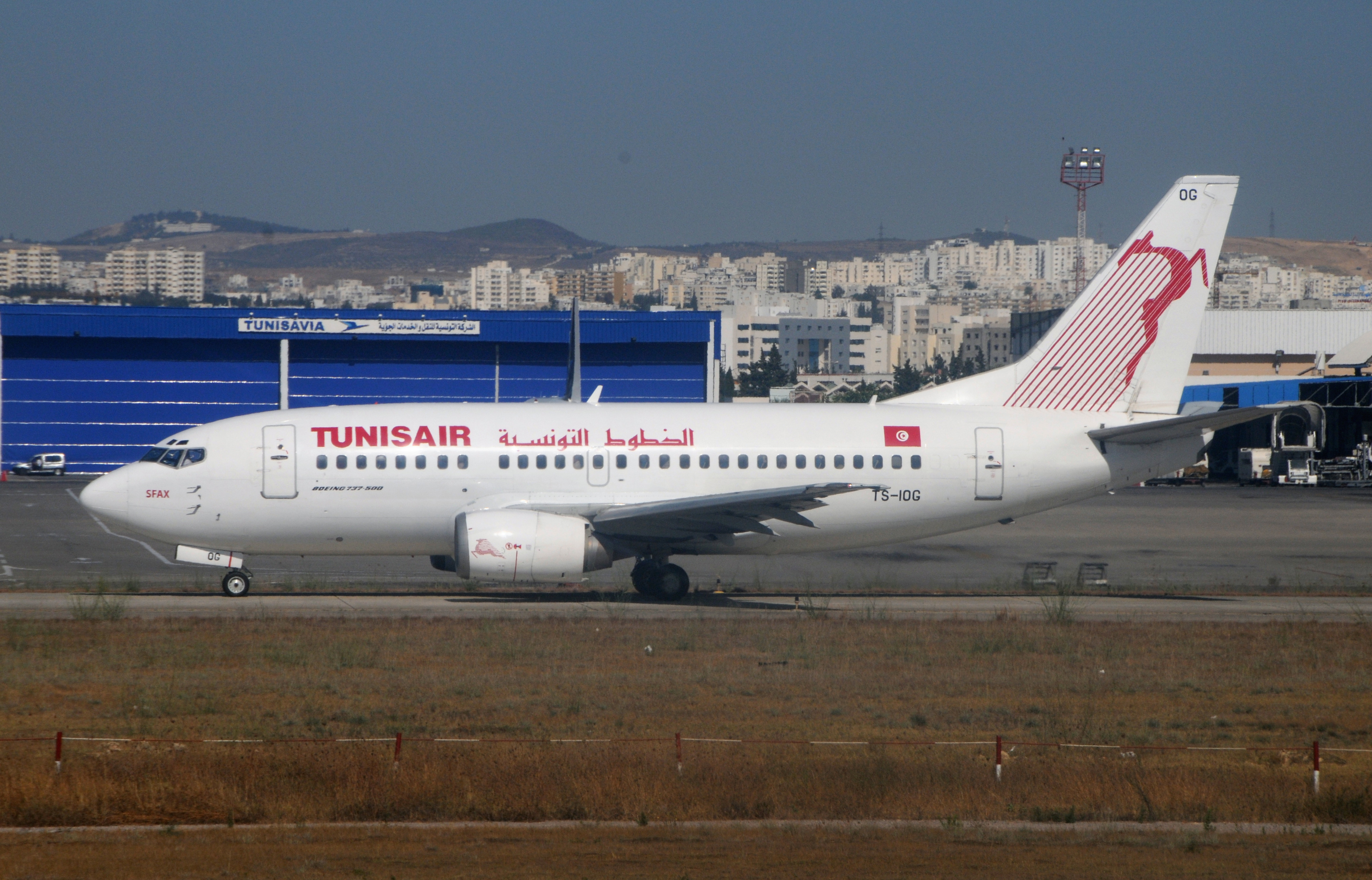 Un Boeing 737 de Tunisair sur une piste à l'aéroport de Tunis Carthage